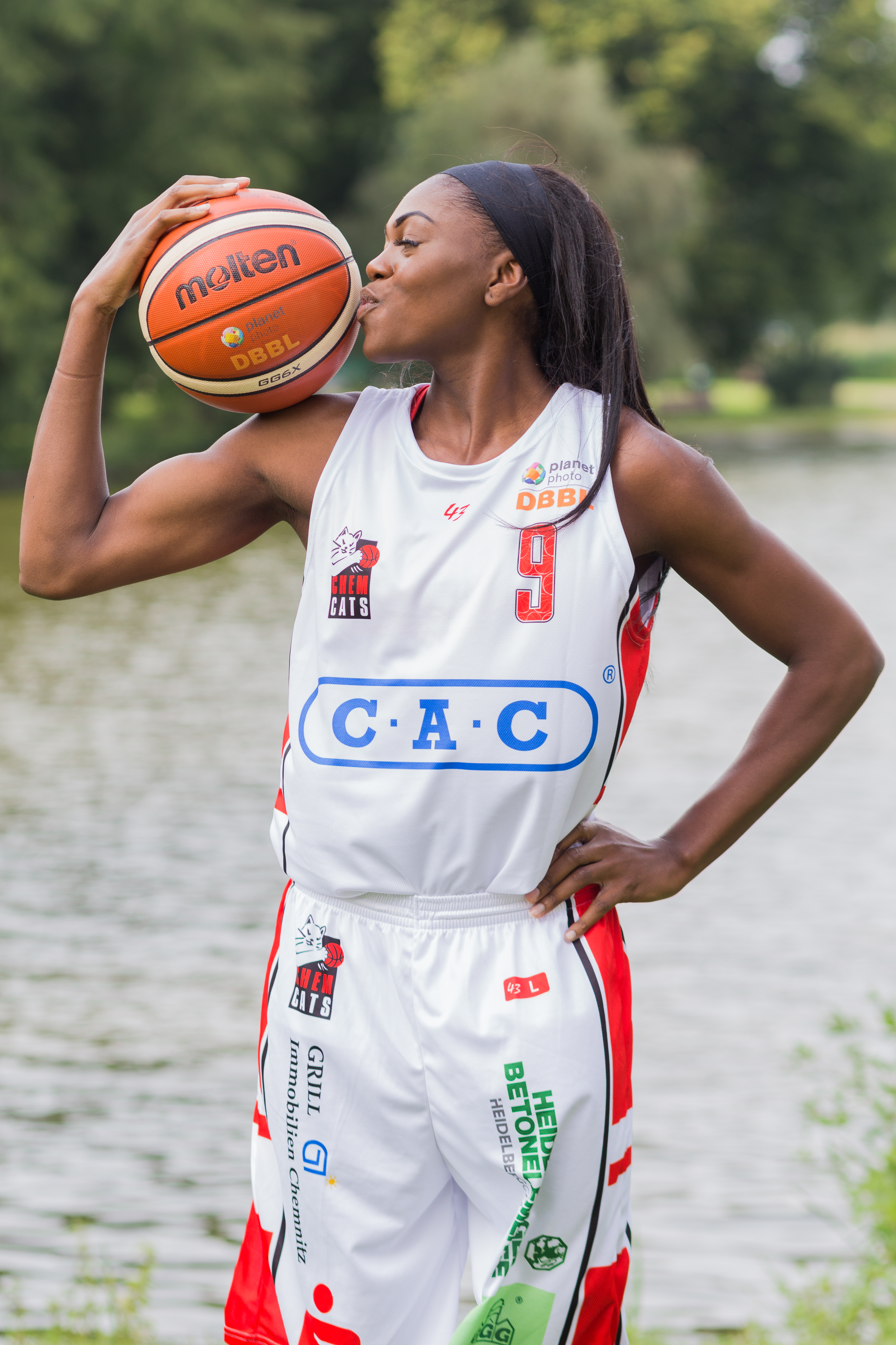 Basketball, 1. Damen-Basketball-Bundesliga, ChemCats Chemnitz; Abigail Asoro (9)